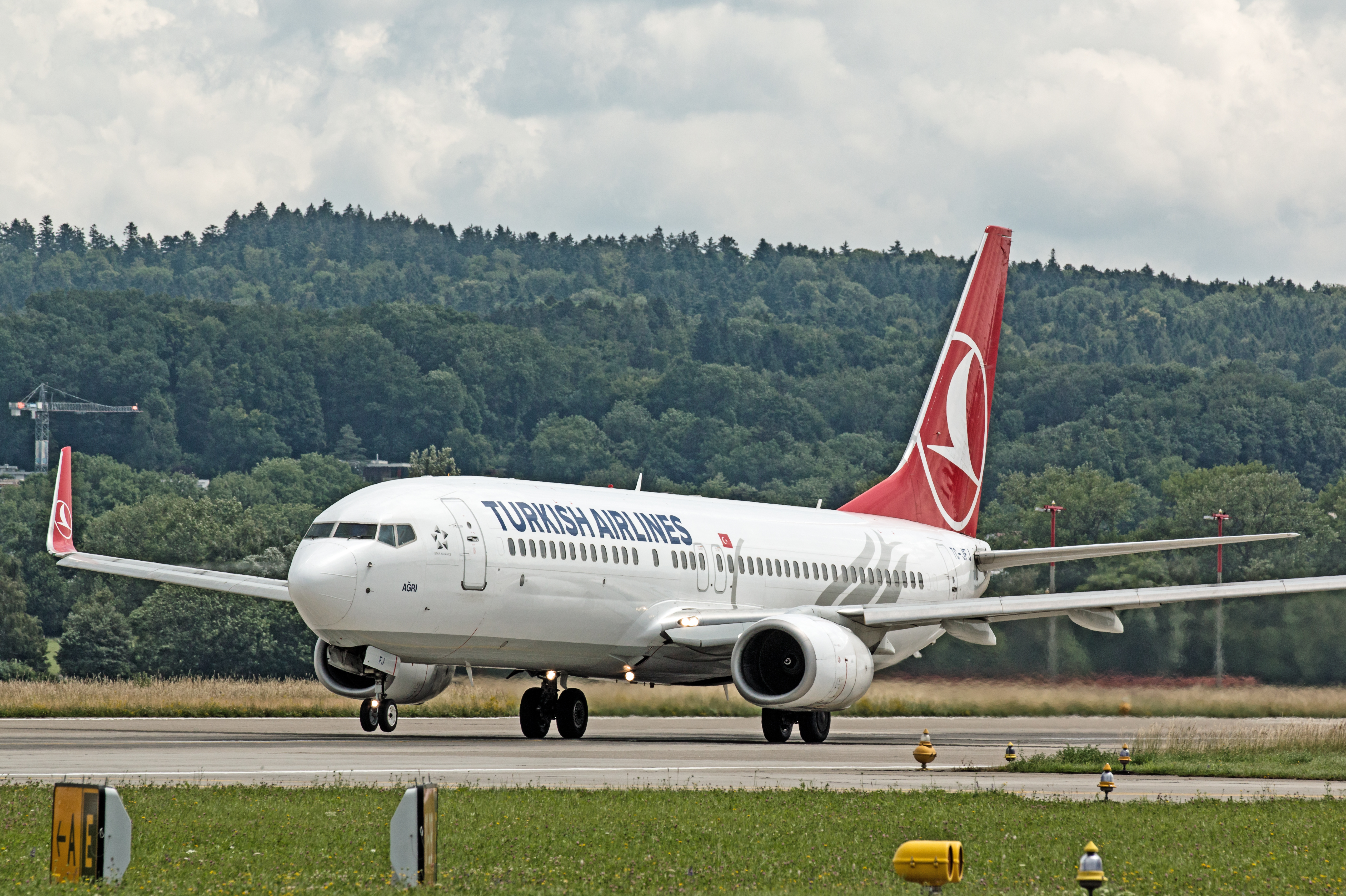 Boeing B737-8F2 First flight date 23.03.1999